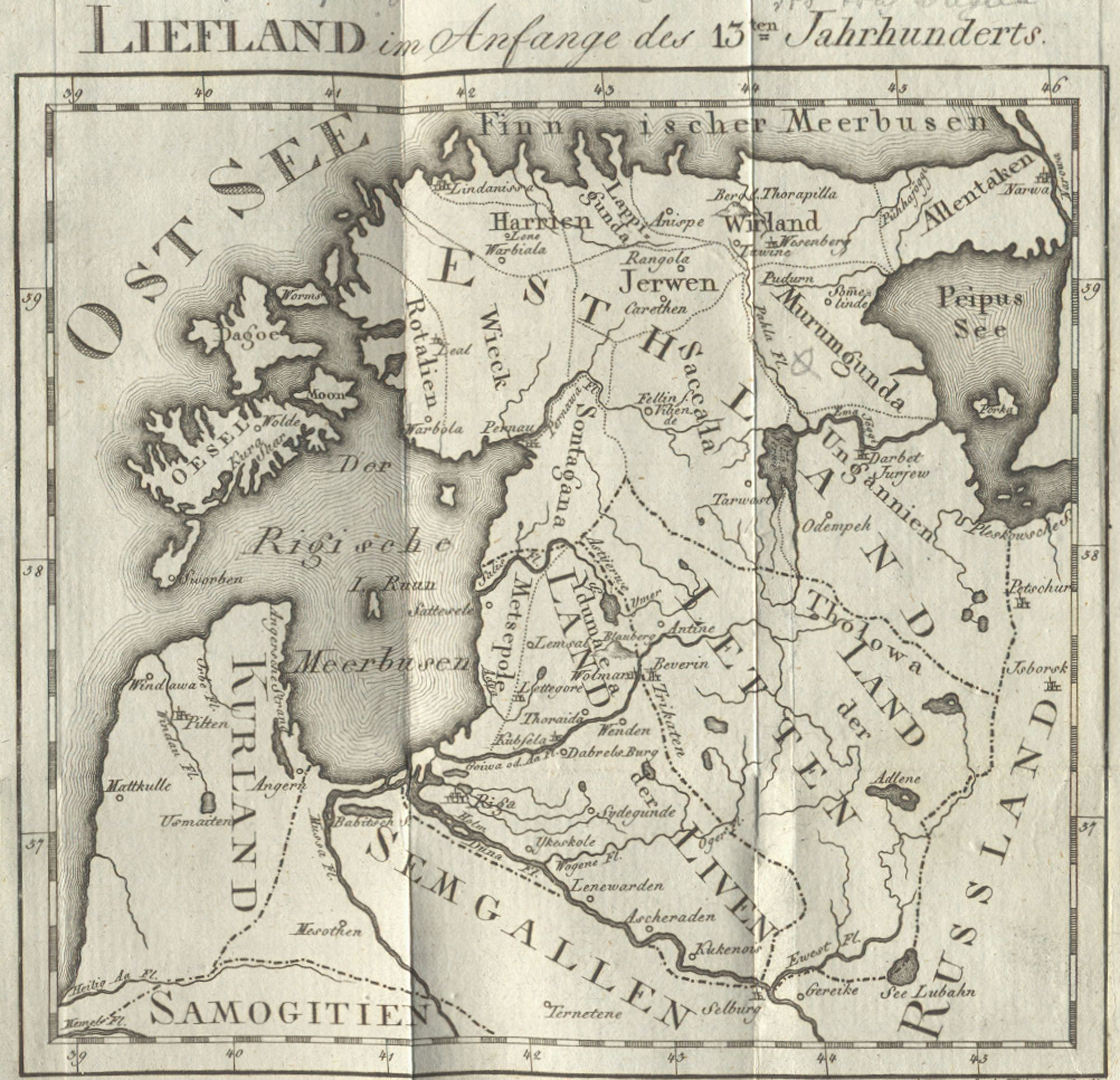 G. Merkel, Die Letten vorzüglich in Liefland am Ende des philosophischen Jahrhunderts, 13 saj kaart